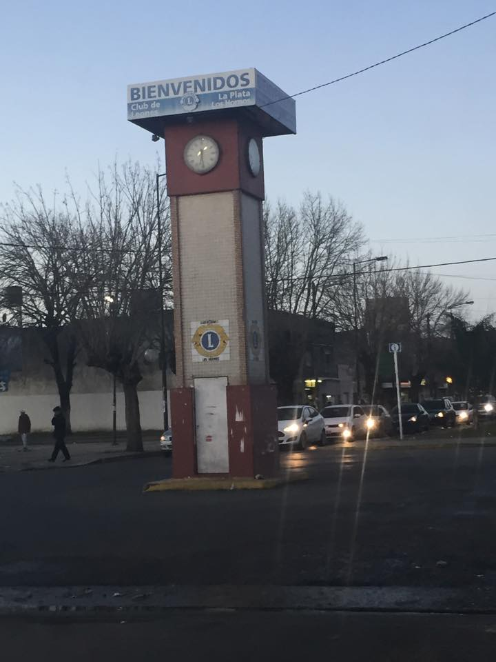 reloj vertical